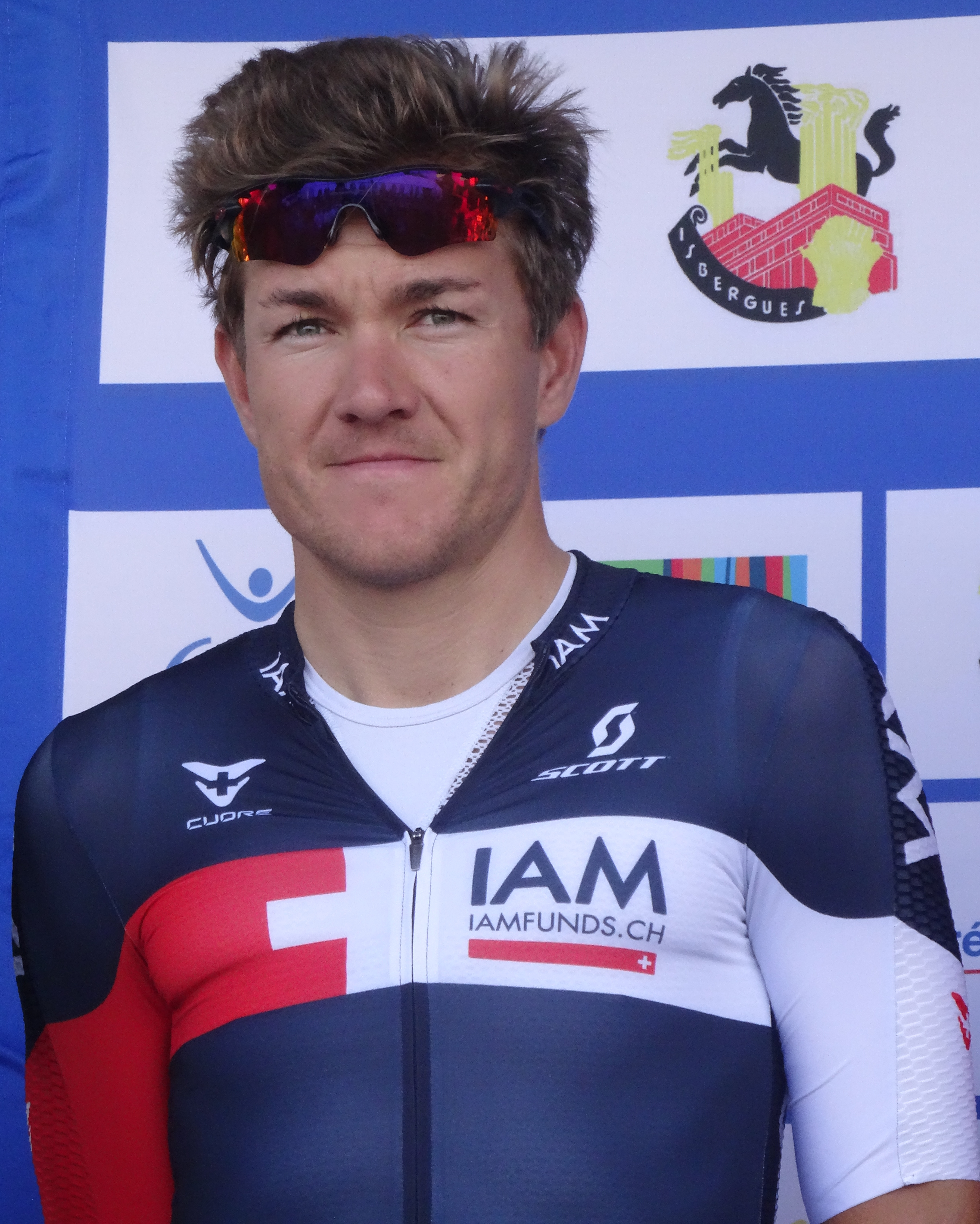 Reportage réalisé le dimanche 21 septembre à l'occasion du départ et de l'arrivée du Grand Prix d'Isbergues 2014 à Isbergues, Nord-Pas-de-Calais, France.